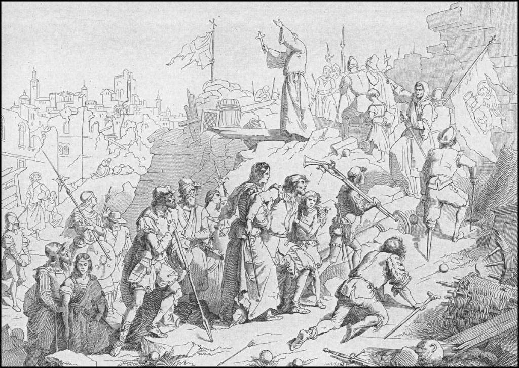 LA SCHEDA STORICA – 103, "Conquistata la capitale di Cipro, Nicosia, i turchi vogliono completare al più presto l’operazione occupando anche l’altra importante città di Famagosta. Qui, però malgrado la disperata situazione e la pressoché totale mancanza d’aiuti esterni, la resistenza all’assedio turco si preannuncia subito decisa …"